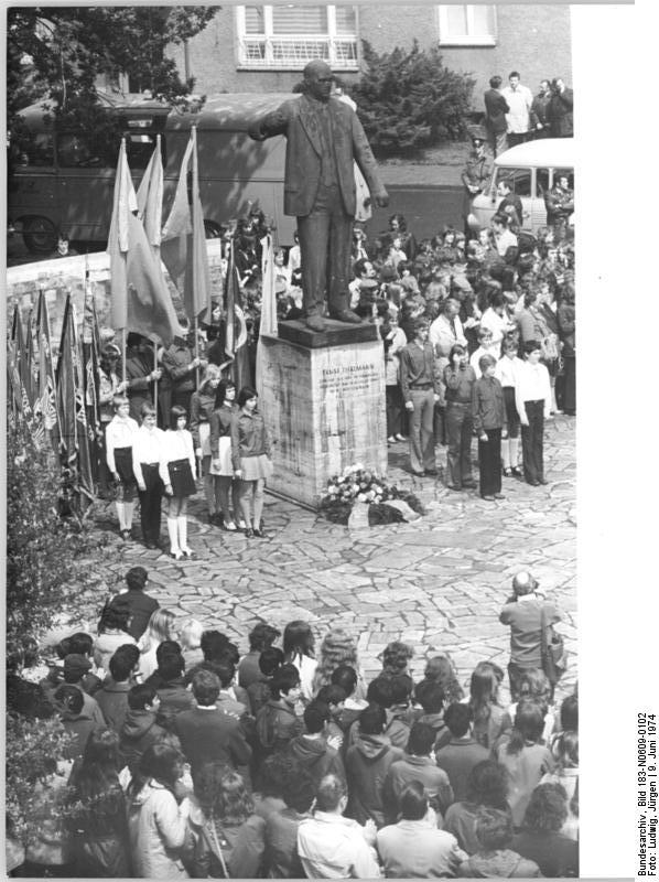 Erfurt, Treffen von FDJ und JP ADN-ZB Ludwig-9.6.74 Bez. Erfurt: 15. Arbeiterfestspiele - Mehr als 5.000 Pioniere und FDJ-Mitglieder aus dem Bezirk Erfurt ehrten mit einem Kampfmeeting am 9.6.74 auf dem Weimarer "Platz der 56 000" das Vermächtnis Ernst Thälmanns.